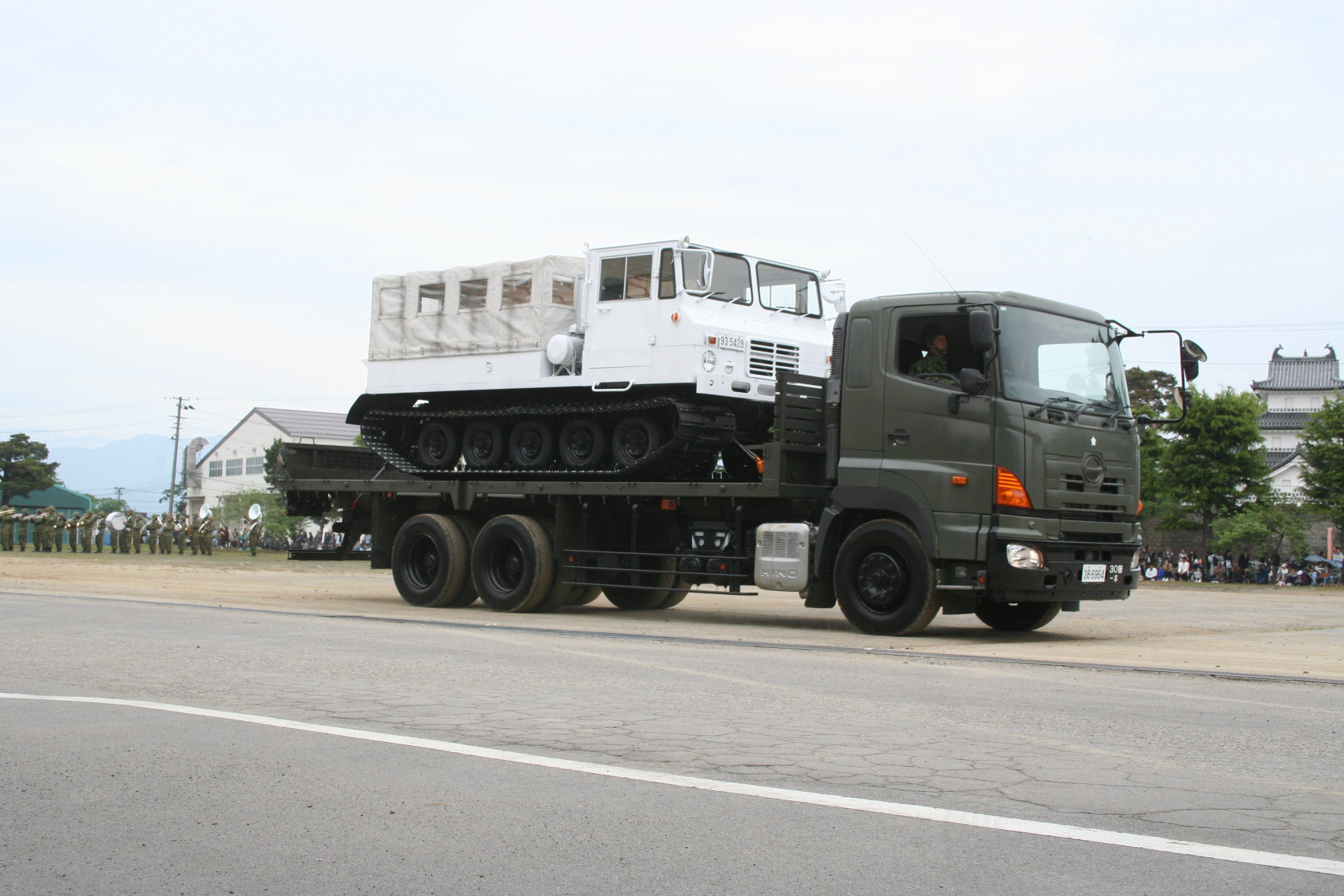 2018年5月13日撮影